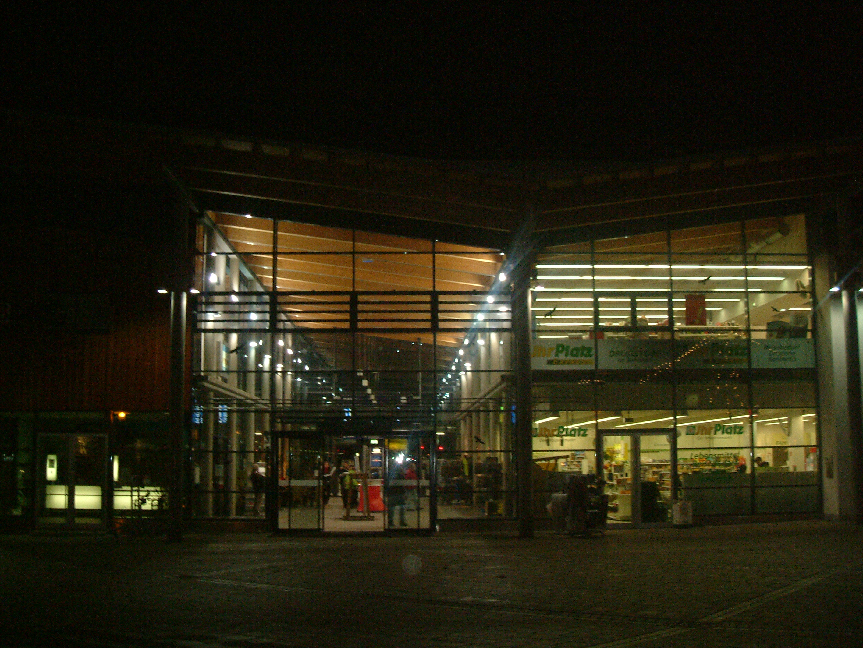 Bahnhof Oberstdorf